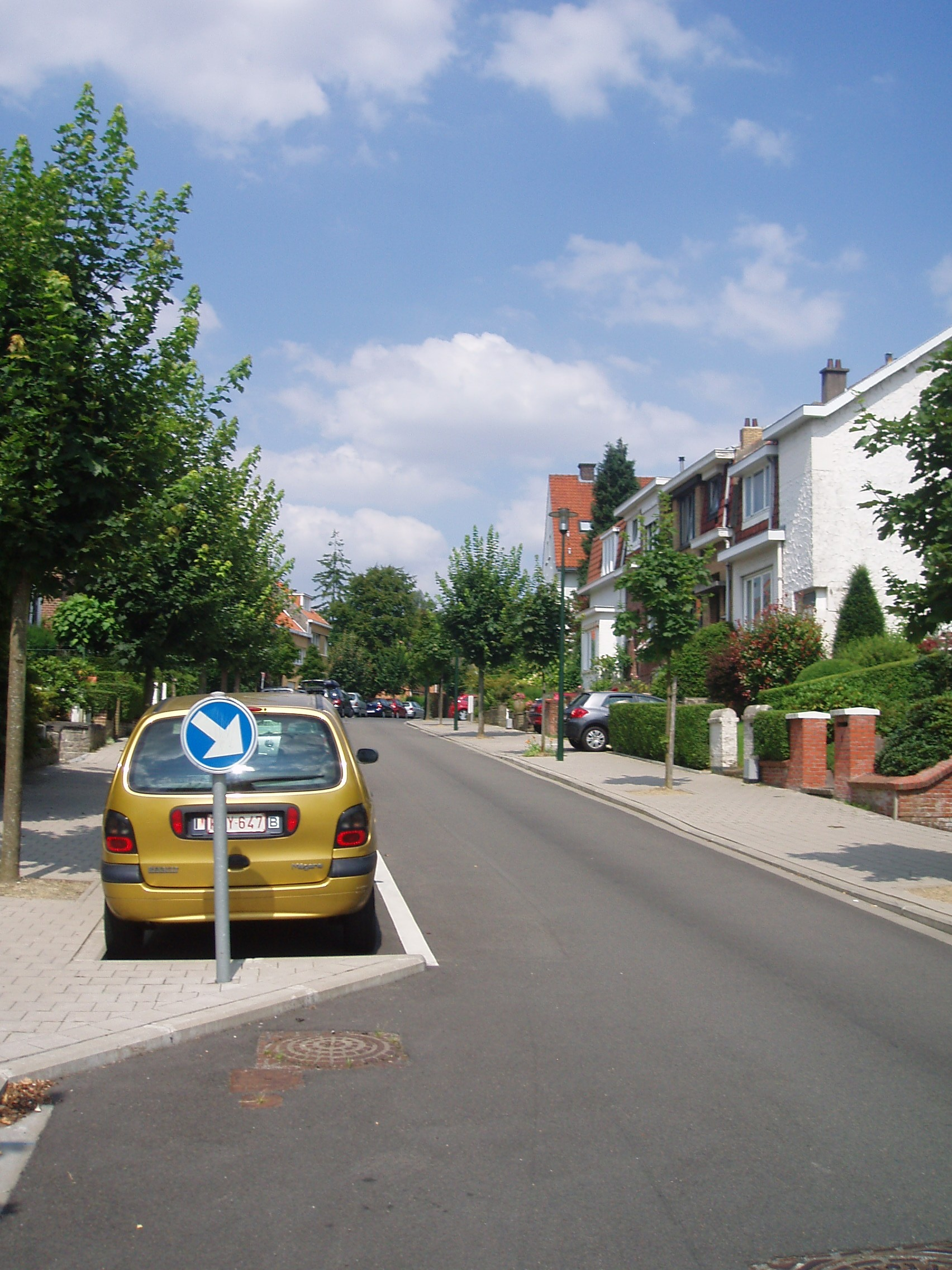 avenue Sainte Anne Auderghem Belgium